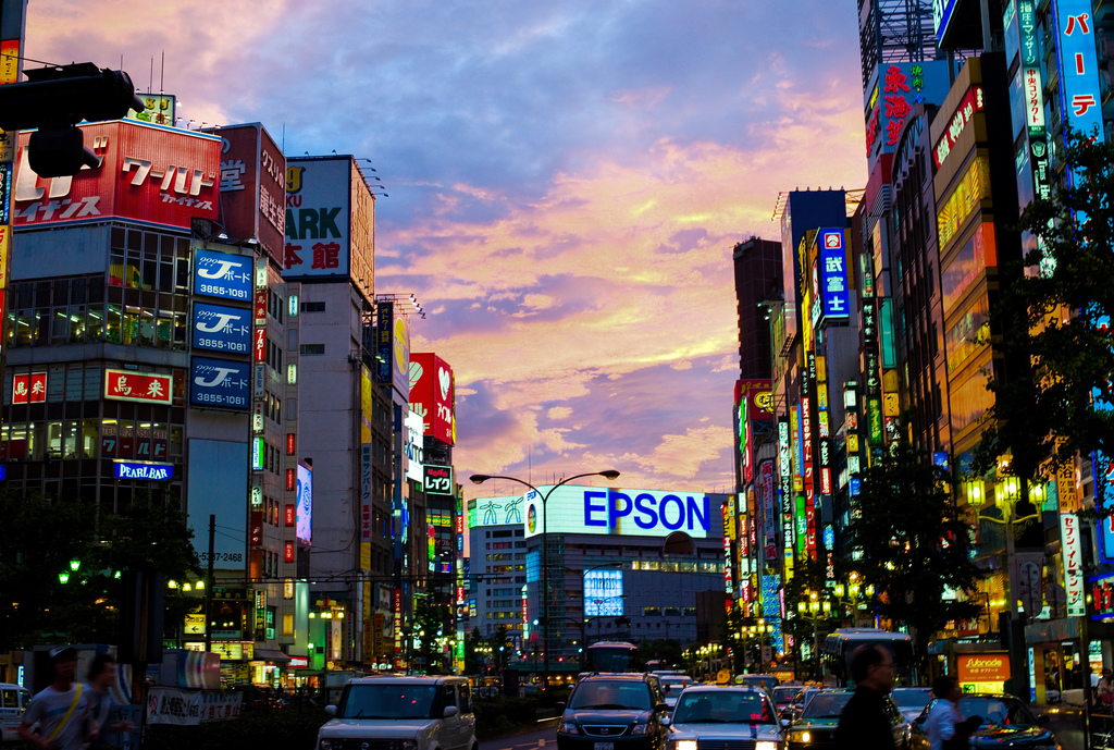 Shinjuku